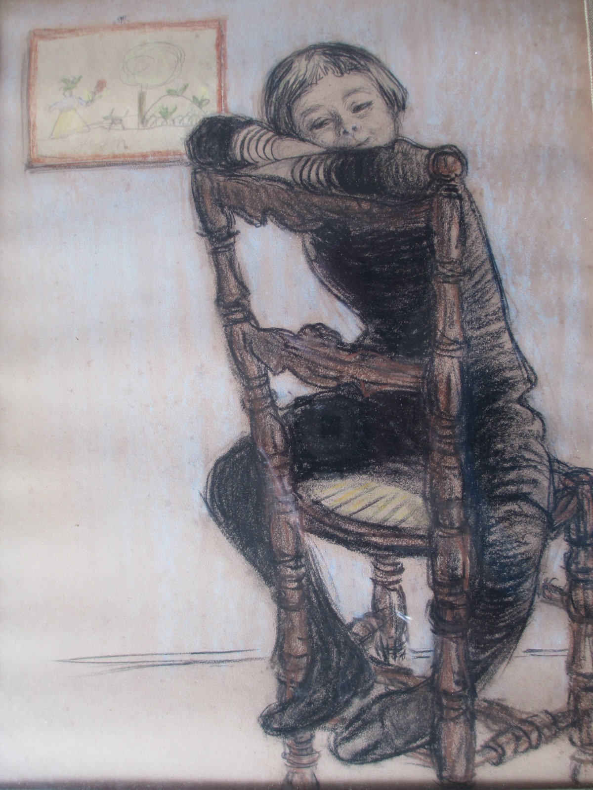 Portrait de Jean Malo-Renault (1900-1988), enfant assis à califourchon sur une chaise, dessiné par son père, Émile Malo-Renault (1870-1938), pastel collection particulière.